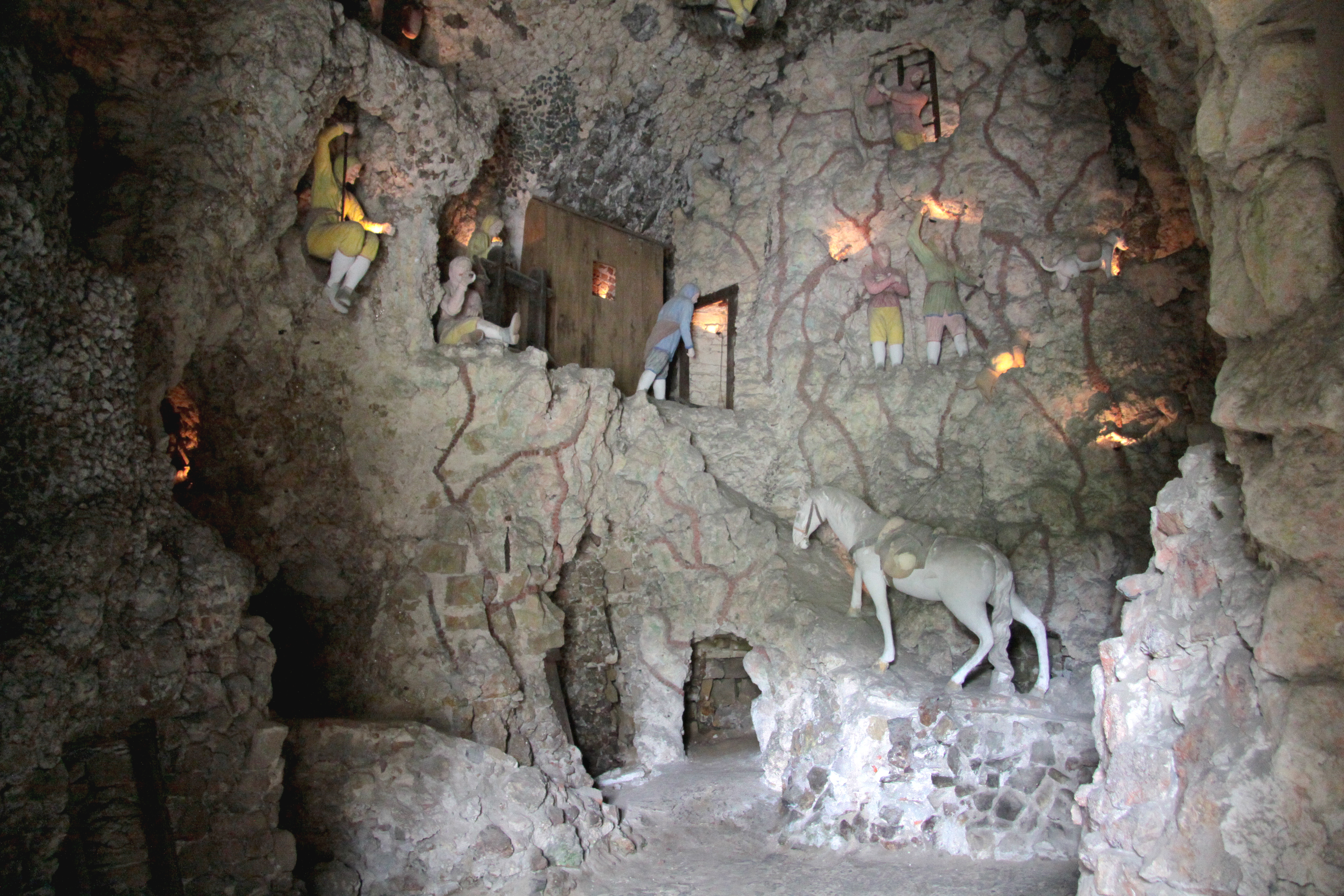 Grotta - sala terrena zámek Kroměříž